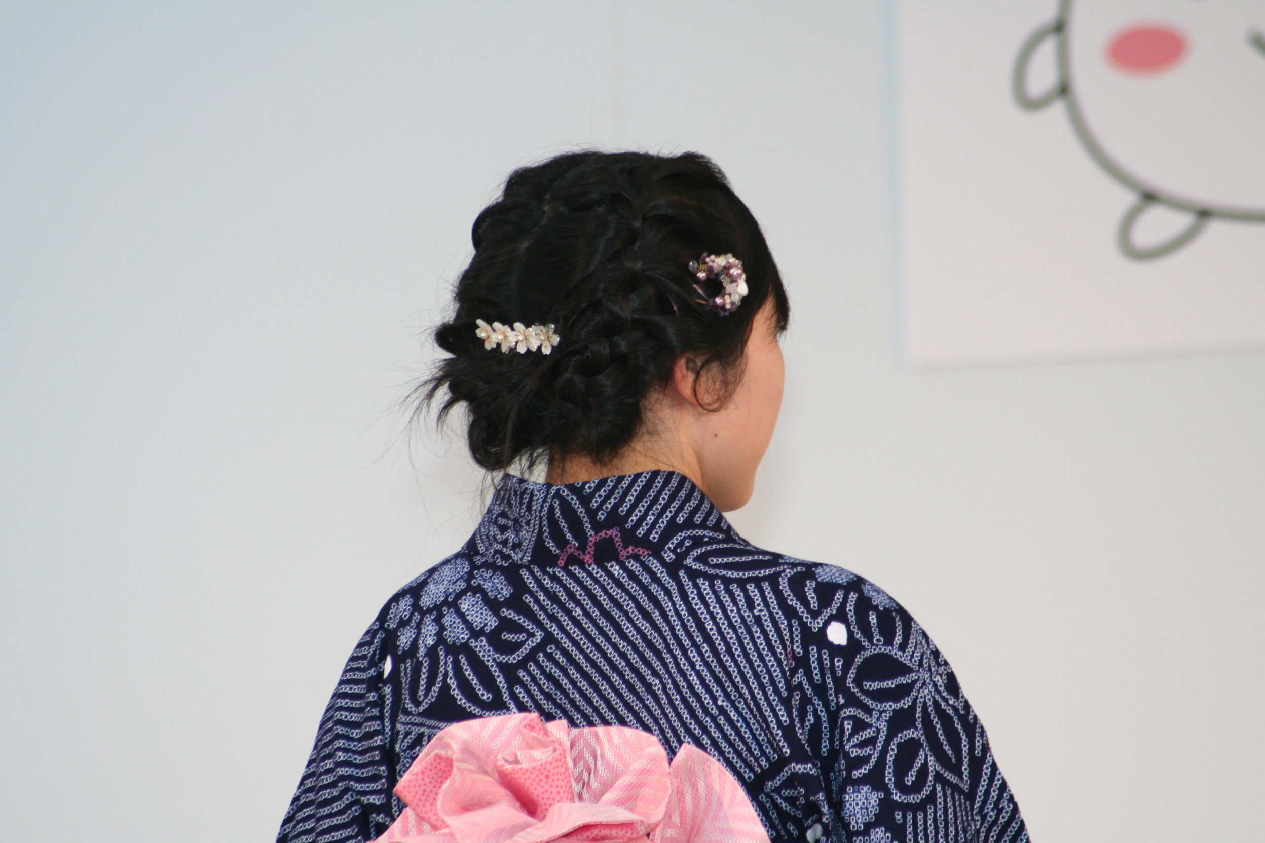 2010年6月22日から23日に、兵庫県姫路市姫路城南の大手前公園にて開催された姫路浴衣祭の催しの様子など。祭り初日を撮影。